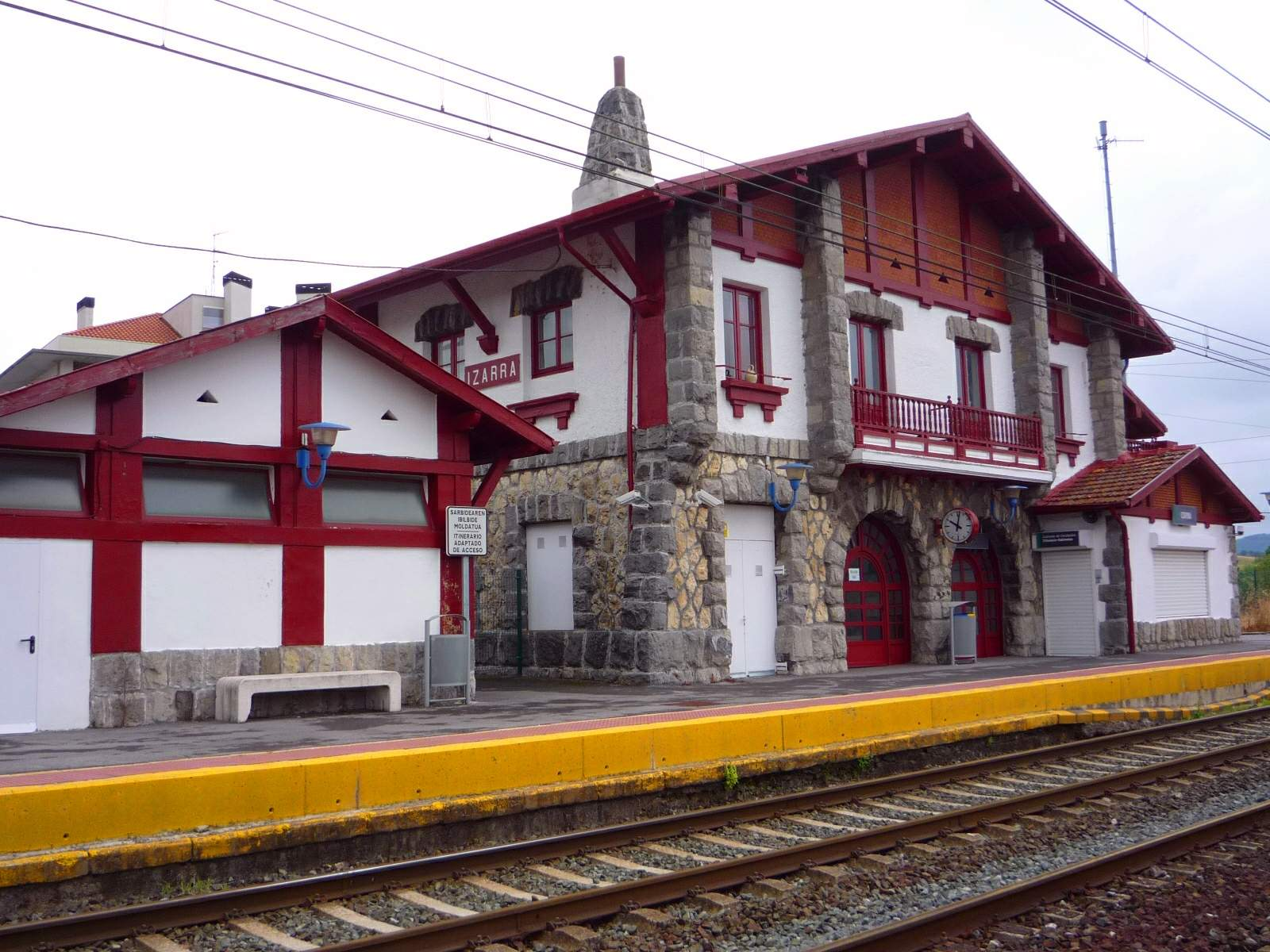 Estación de Adif de Izarra (Ayuntamiento de Urkabustaiz, Álava)